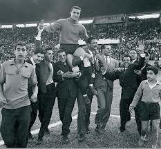 Le lieutenant Hosni Benslimane, gardien de but des FAR de Rabat, est porté par son equipe après avoir gagné la coupe du Trône